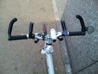 handle bar with bar-end-bar & Bar-enter-bar